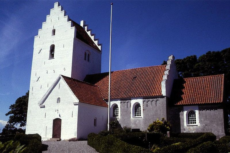 Hammelev Kirke i Danmark. Hammelev kirke